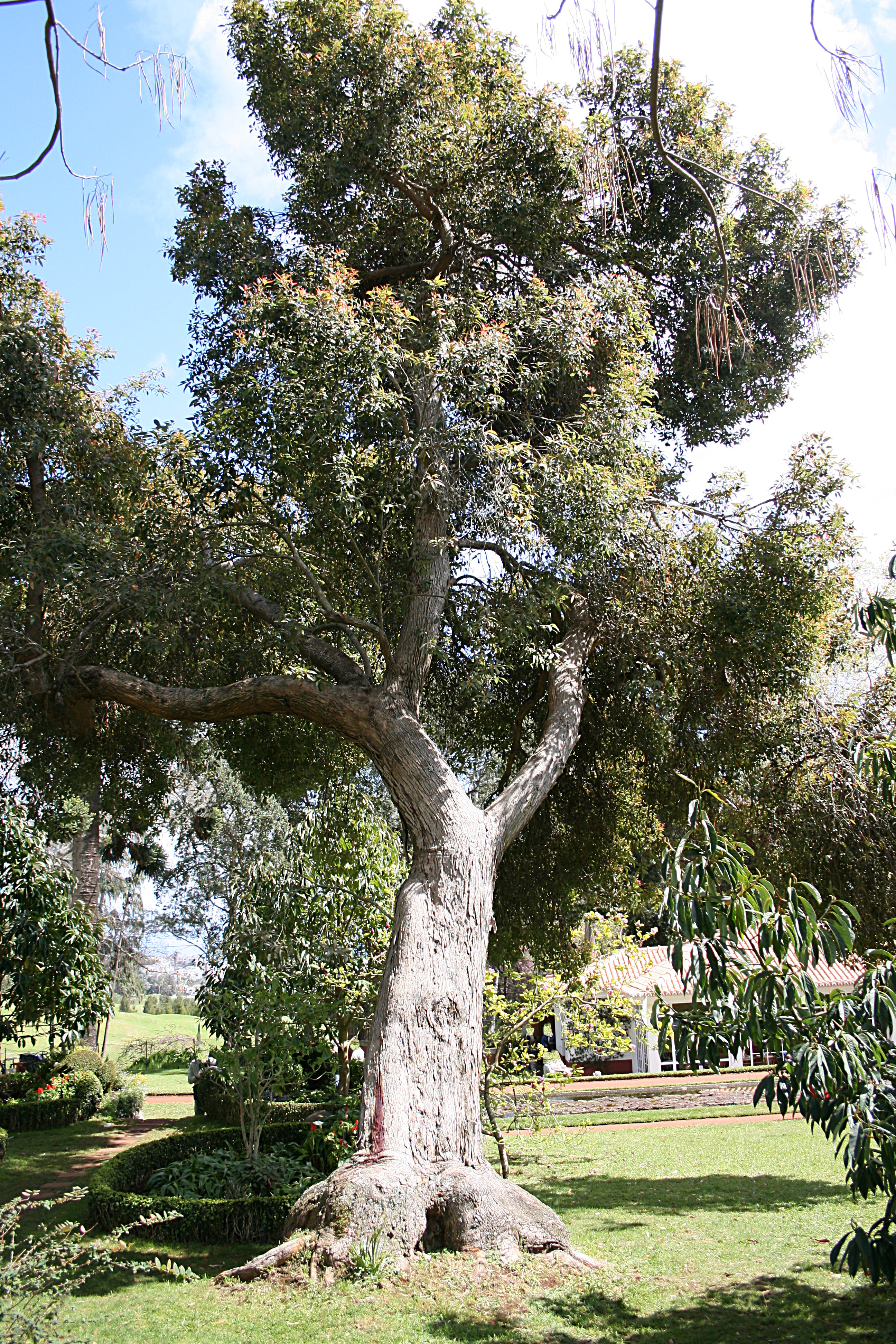 Madeira, Palheiro Gardens - Corymbia ficifolia (Eucalyptus ficifolia)